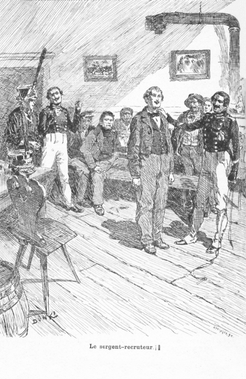 Werbung von Freiwilligen für das preußische Garde-Schützen-Bataillon in Neuchâtel